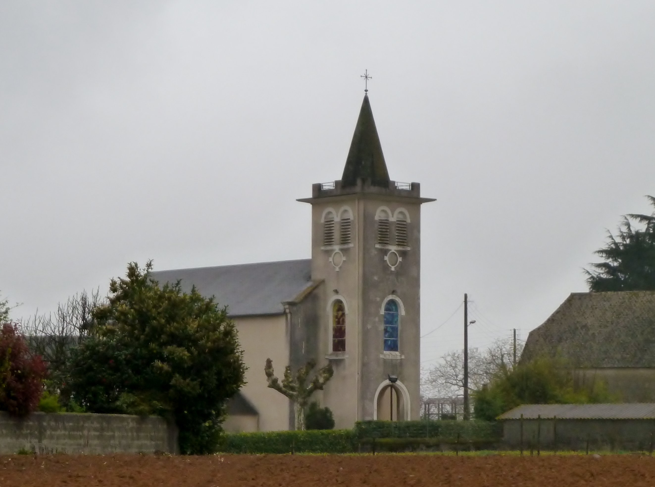 Eglise d'Eslourenties-Daban